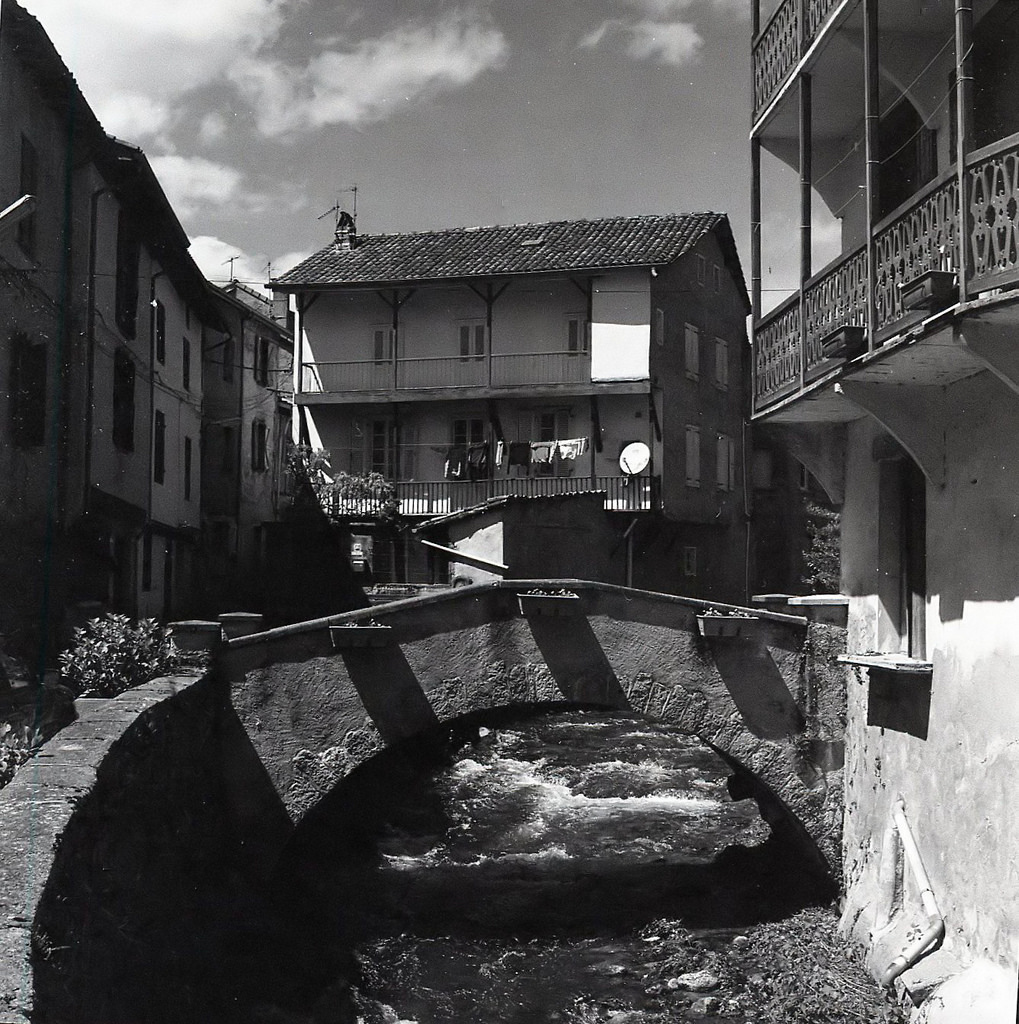 Le ruisseau Esbintz dans sa traversée de Seix (Ariège, France).